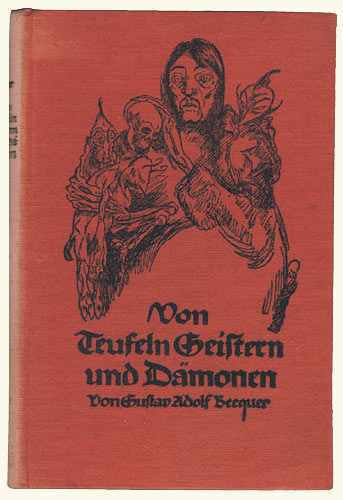 Gustav Adolf Becquer: Von Teufeln, Geistern und Dämonen, München, Georg Müller, 1922. Einband von Paul Haase. (=Galerie der Phantasten. Hrsg. v. Hanns Heinz Ewers. Achter Band)